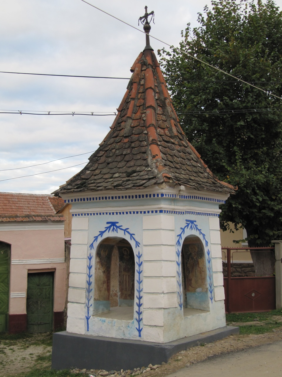 Troiţă din Sibiel